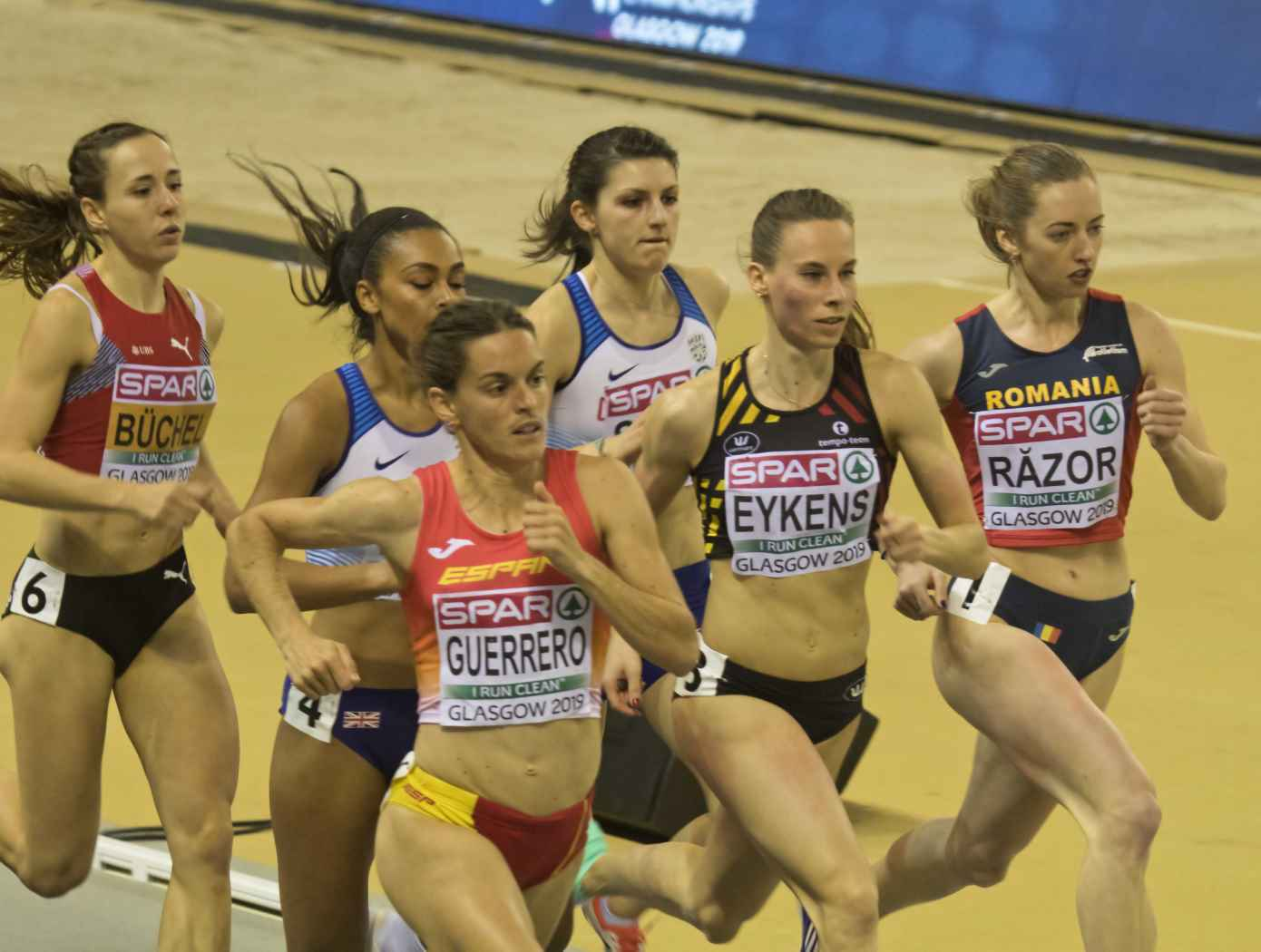 EKI20274 800m semi eykens buchel guerrero